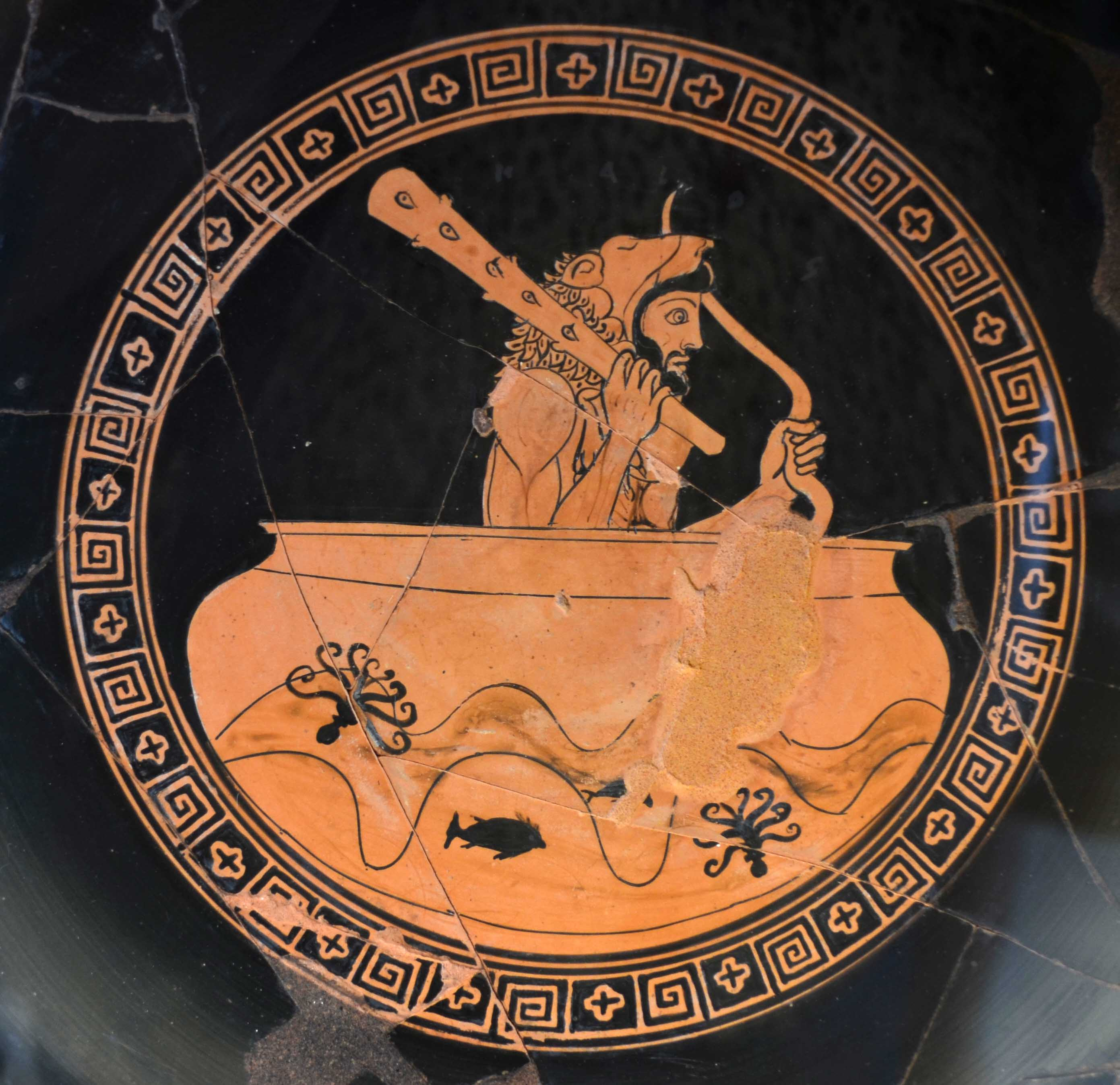 Heracles navega en la copa de Helios, el Sol, en su décimo trabajo. Roma, Museo Vaticano, Museo Gregoriano Etrusco nº 205336. Tondo de un kílix ático de figuras rojas, obra de Duris según Beazley, ca. 480 a. de C., de Vulci.